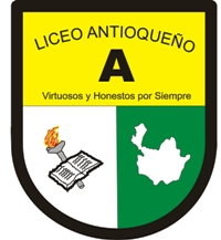 Escudo de la Institución Educativa Liceo Antioqueño